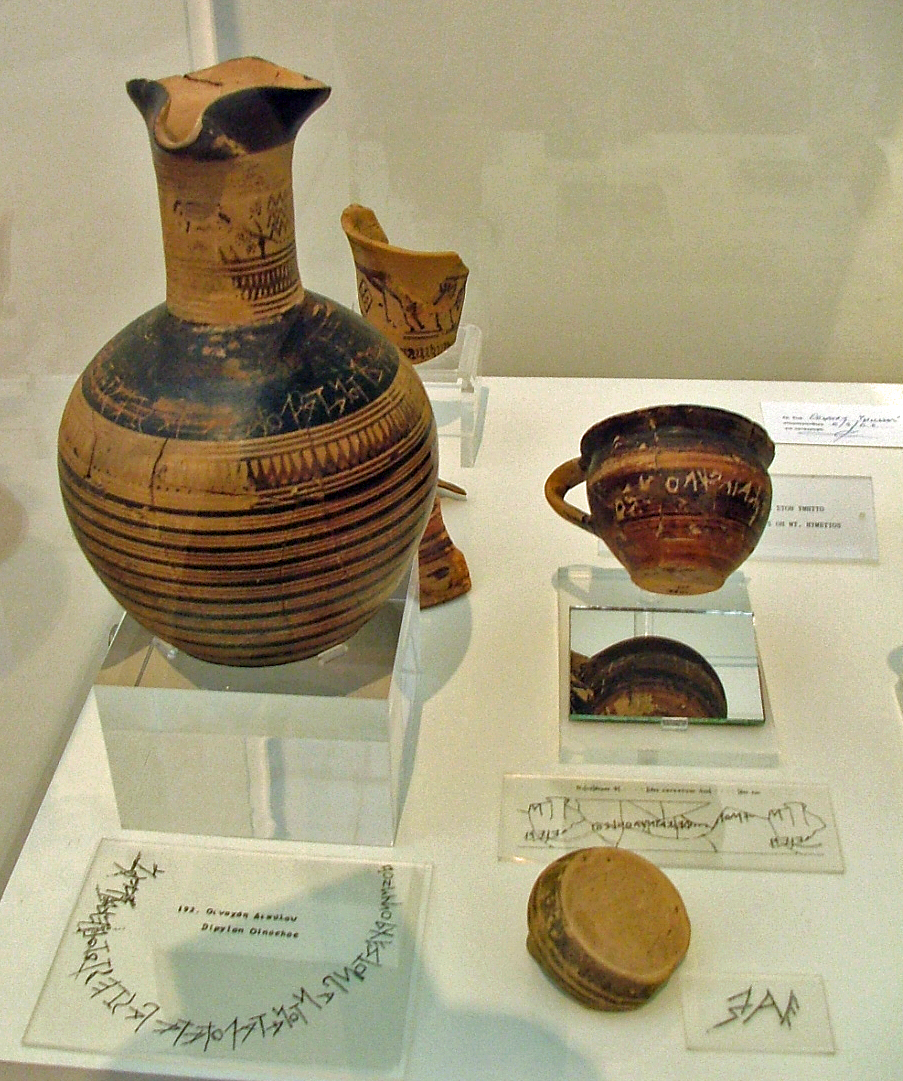 Enócoe del estilo llamado cerámica de Dipylon. Finales del periodo geométrico. Museo Arqueológico Nacional de Atenas.